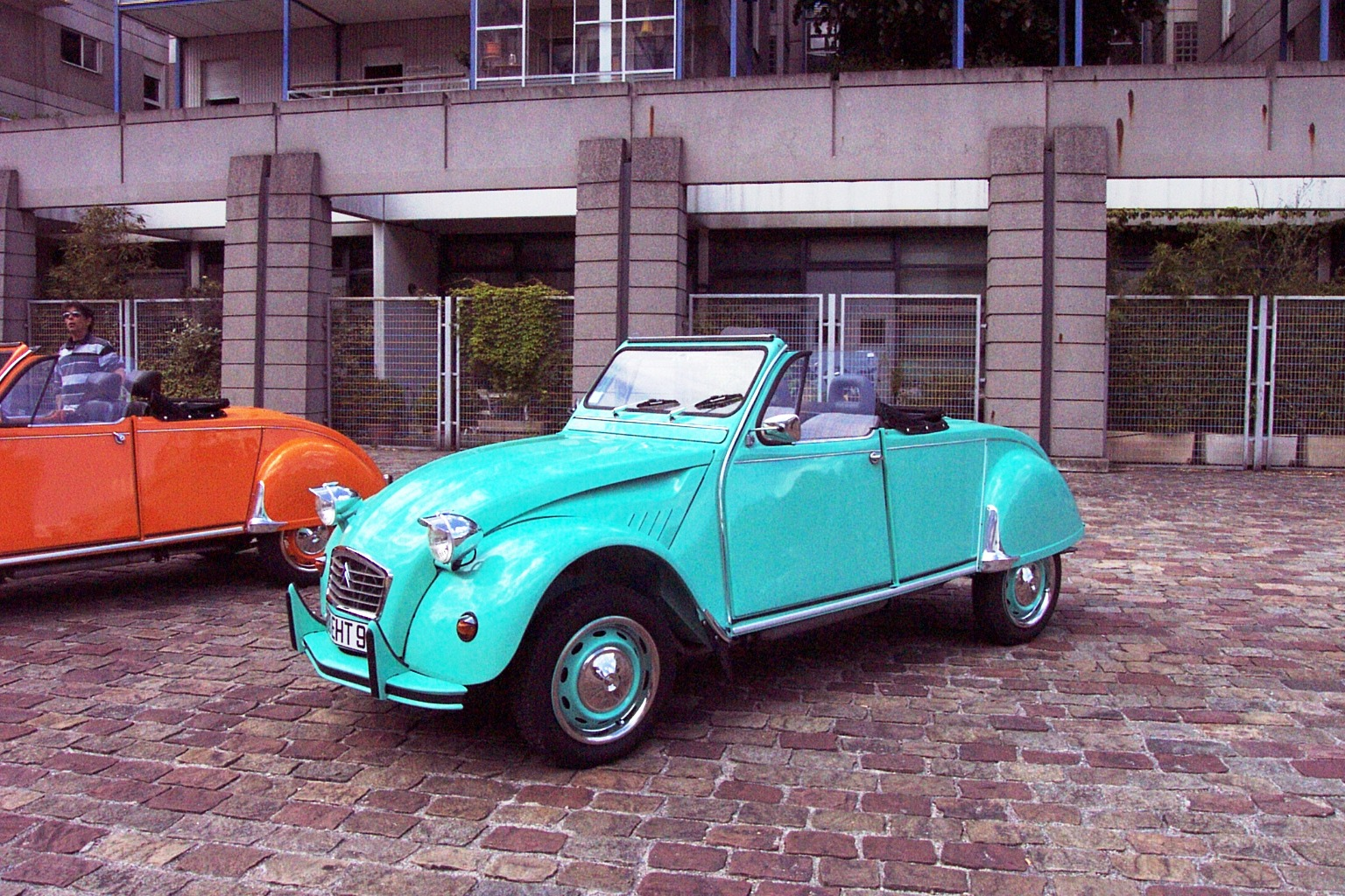 Cabriolet Azelle sur base 2CV citroen